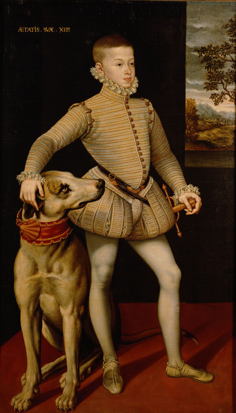 Sohn des Maximilian II. Habsburg Österreich